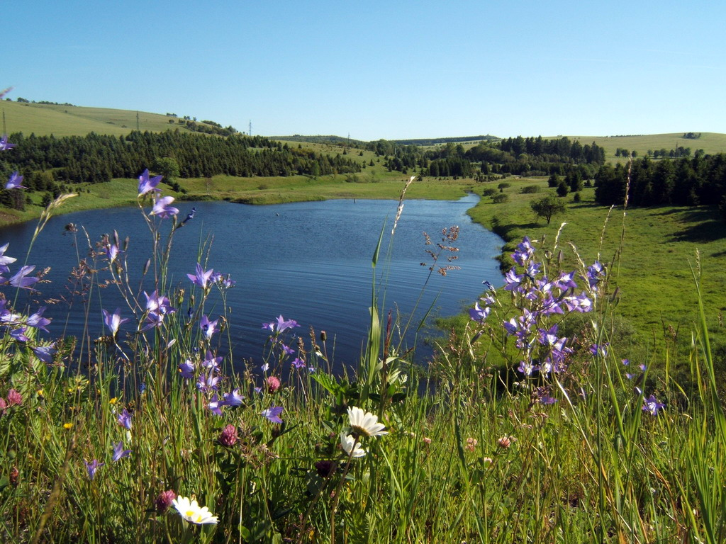 Kleiner Teich hinter dem Staudamm der Preßnitztalsperre